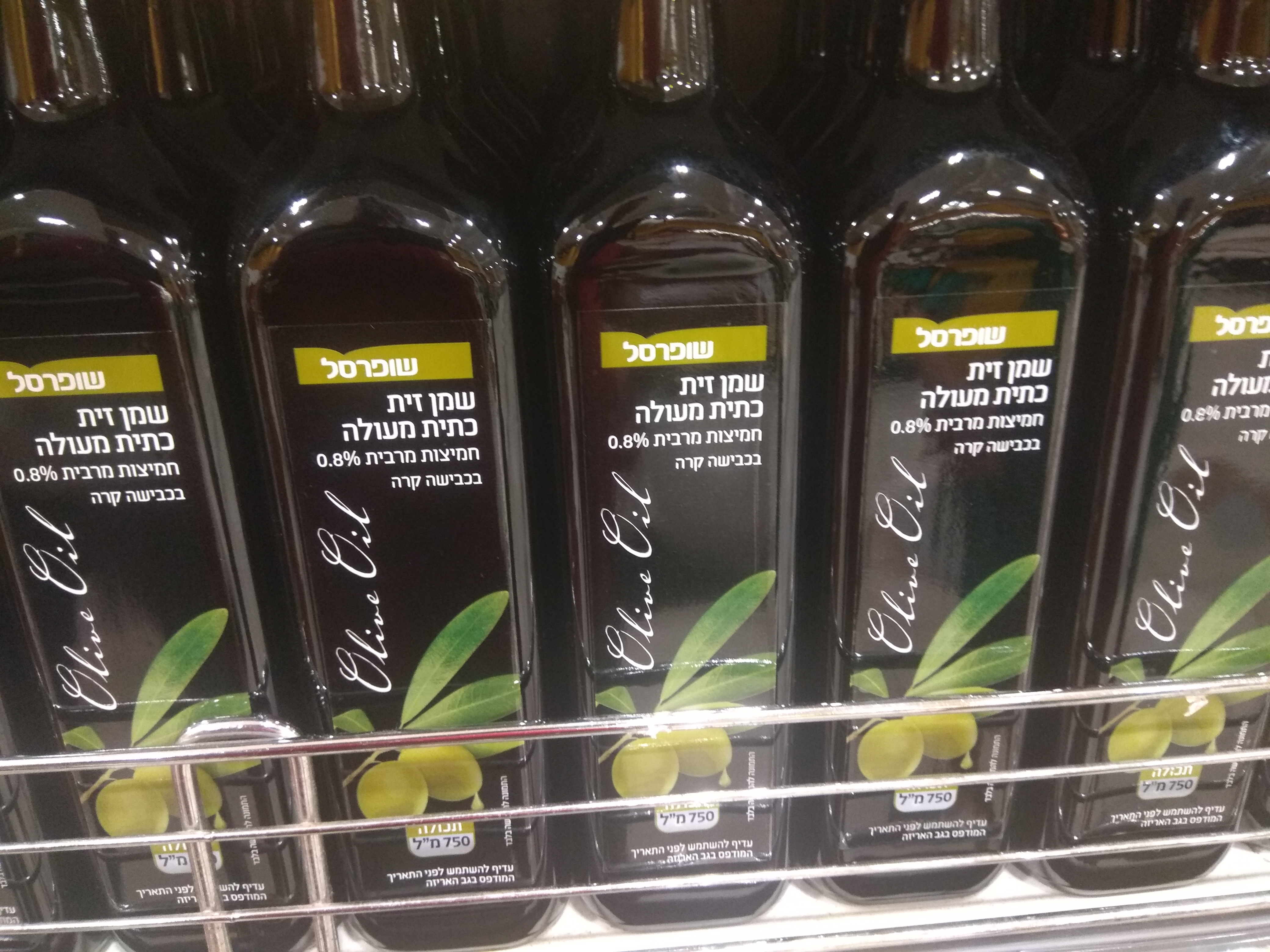 המותג הפרטי של שופרסל